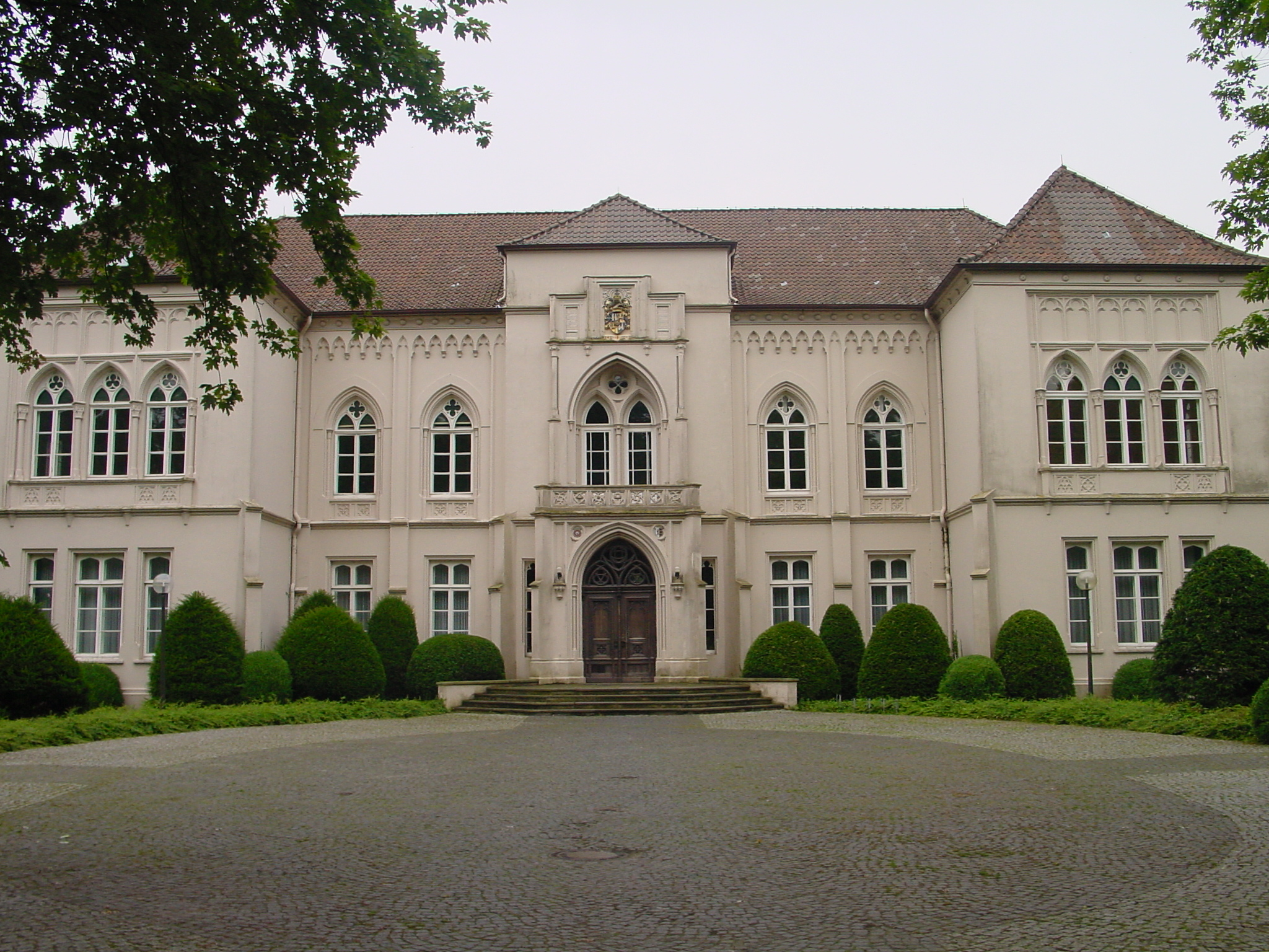 Die Evenburg in Leer, Ostfriesland, Stadtteil Loga.